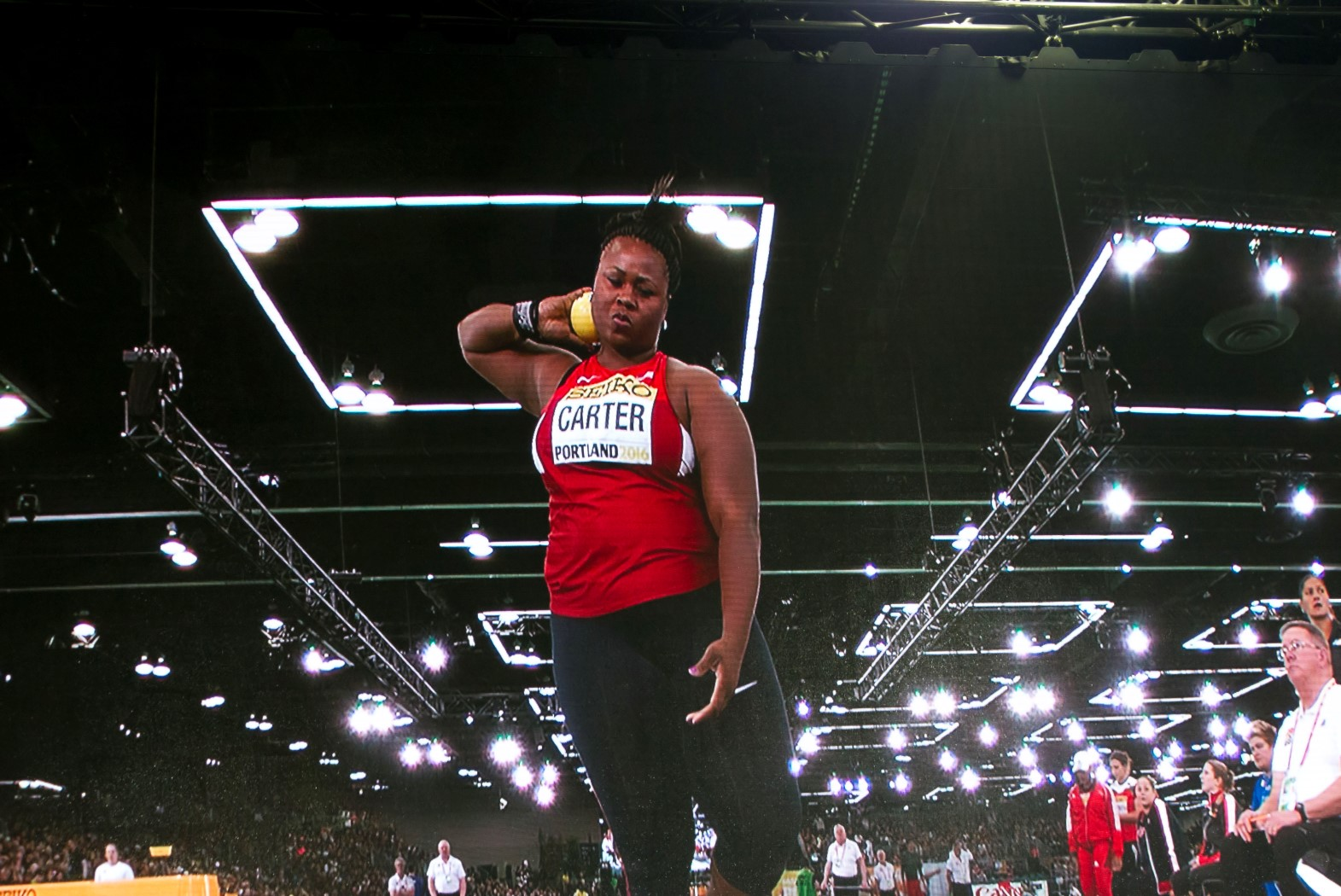 429 michelle carter